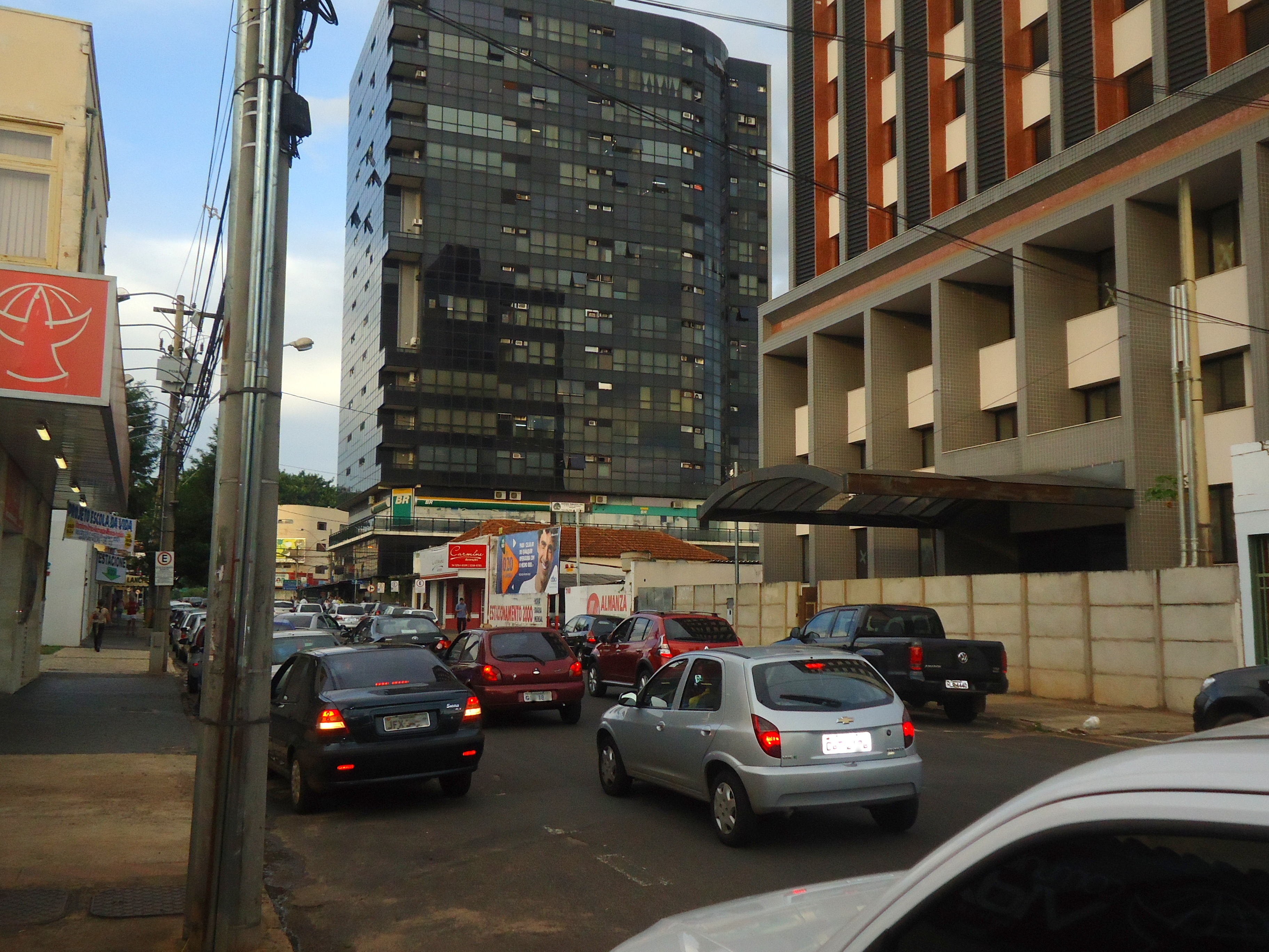 Av. Cesário Alvim, no centro de Uberlândia.